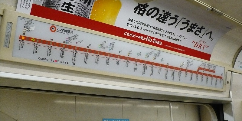 02系の車内